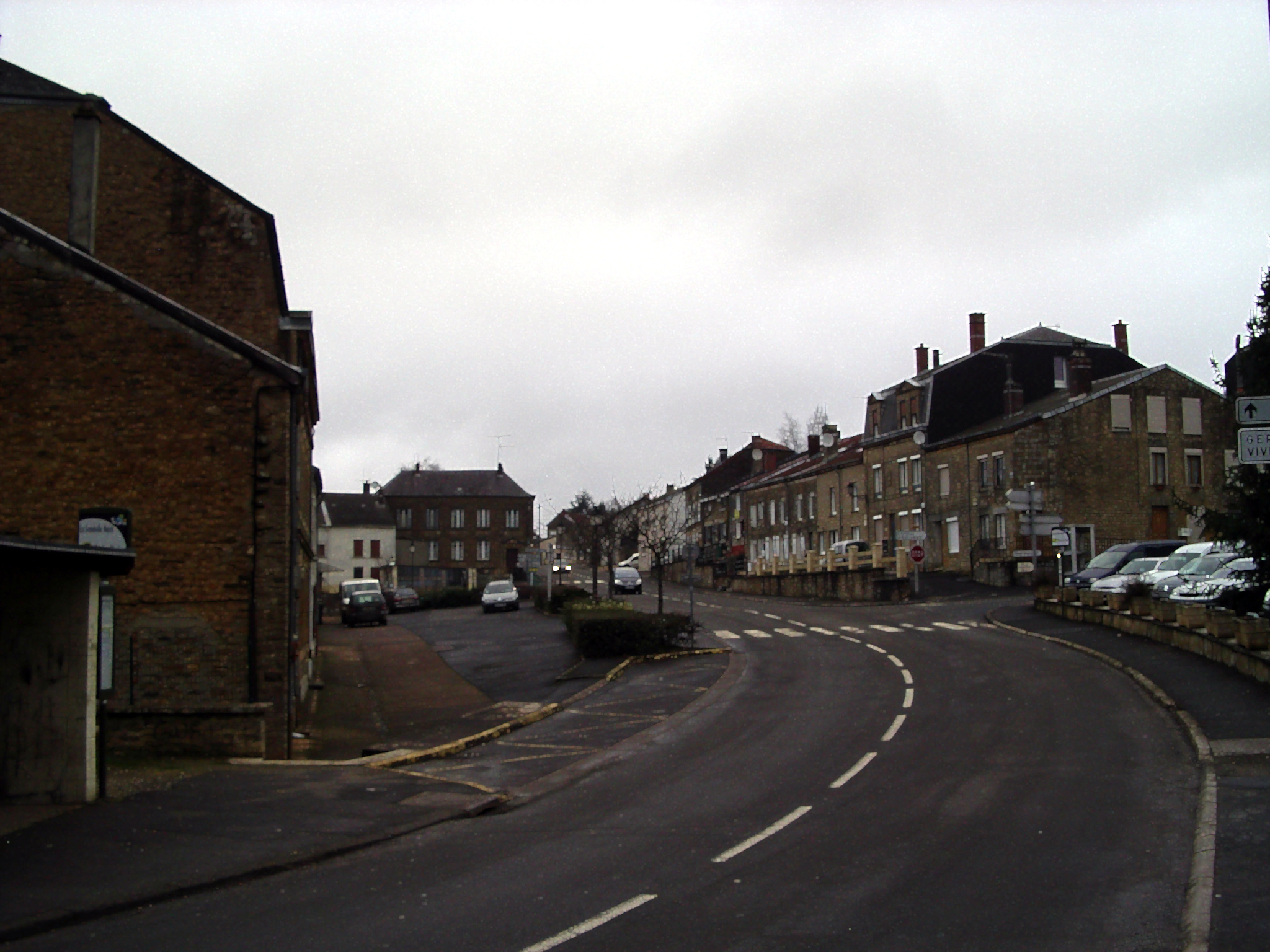 La Grandville est une commune française située dans le département des Ardennes et la région Champagne-Ardenne